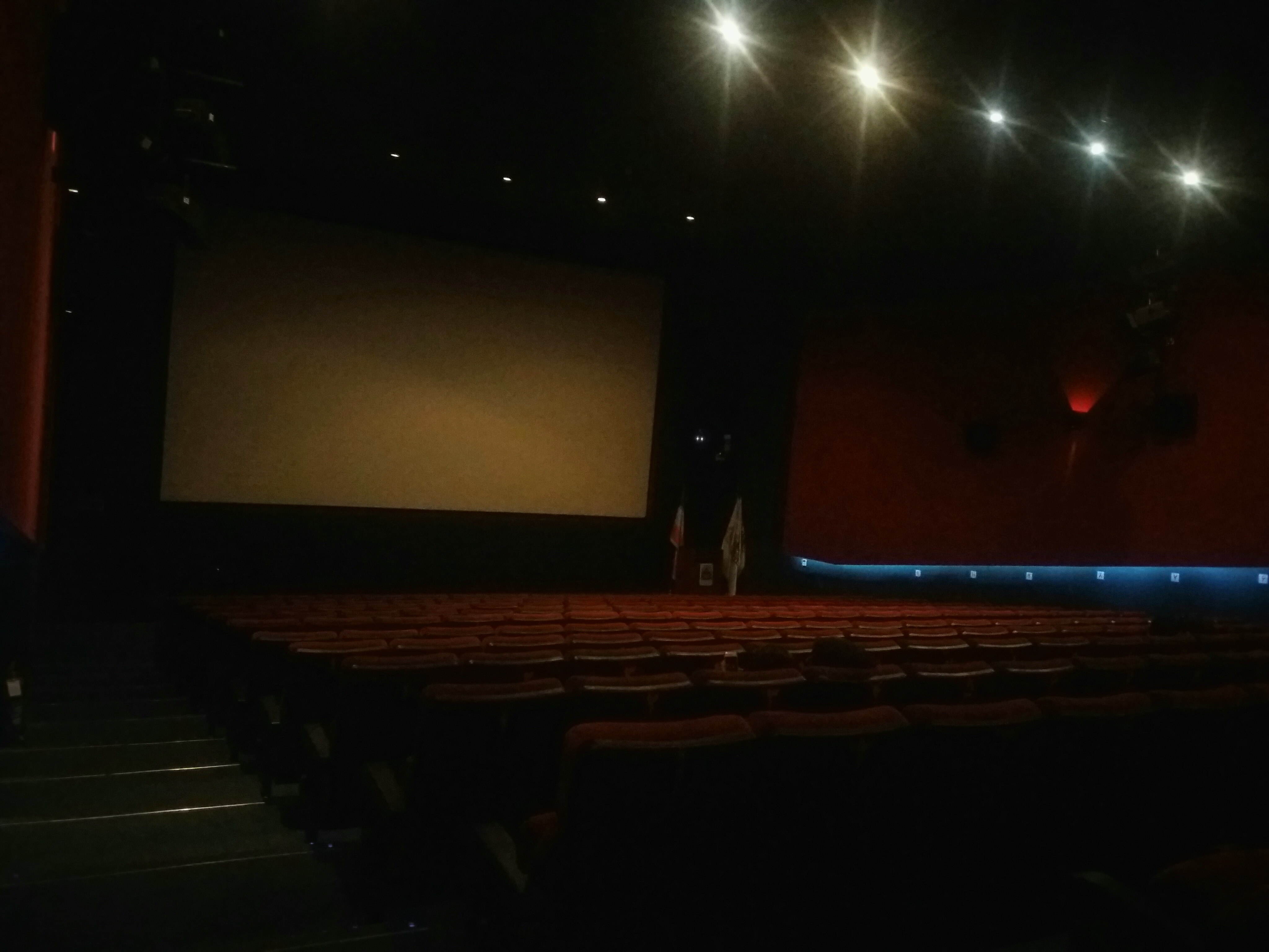 سالن سینماتوگراف موزه سینما ایران - باغ فردوس - تهران -۱۳۹۶